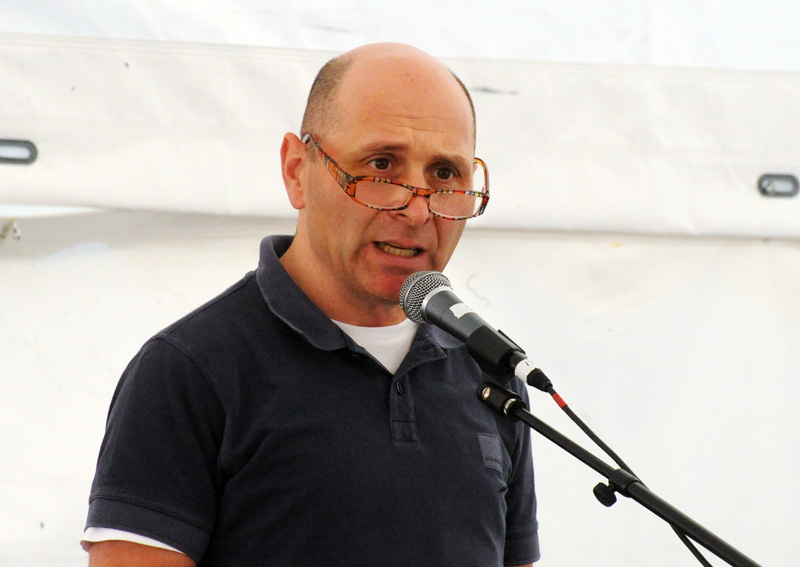 Henry Bronett at the 2013 Stockholm Folk Festival.